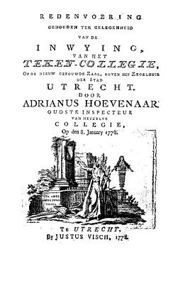 Titelblad inwijdingsrede door Adrianus Hoevenaar van de Utrechtse tekenacademie in 1773